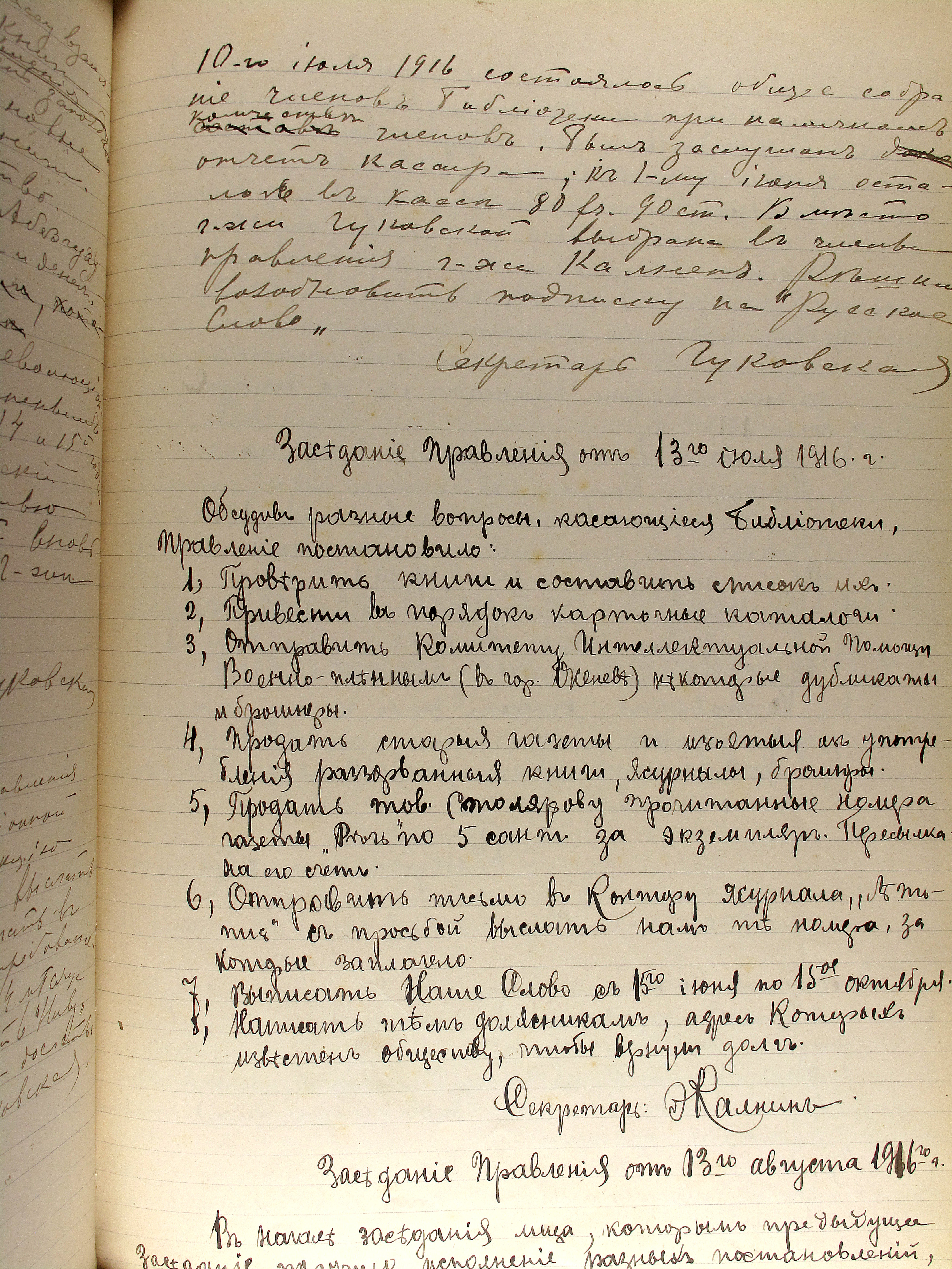 Séance société russe Tlse